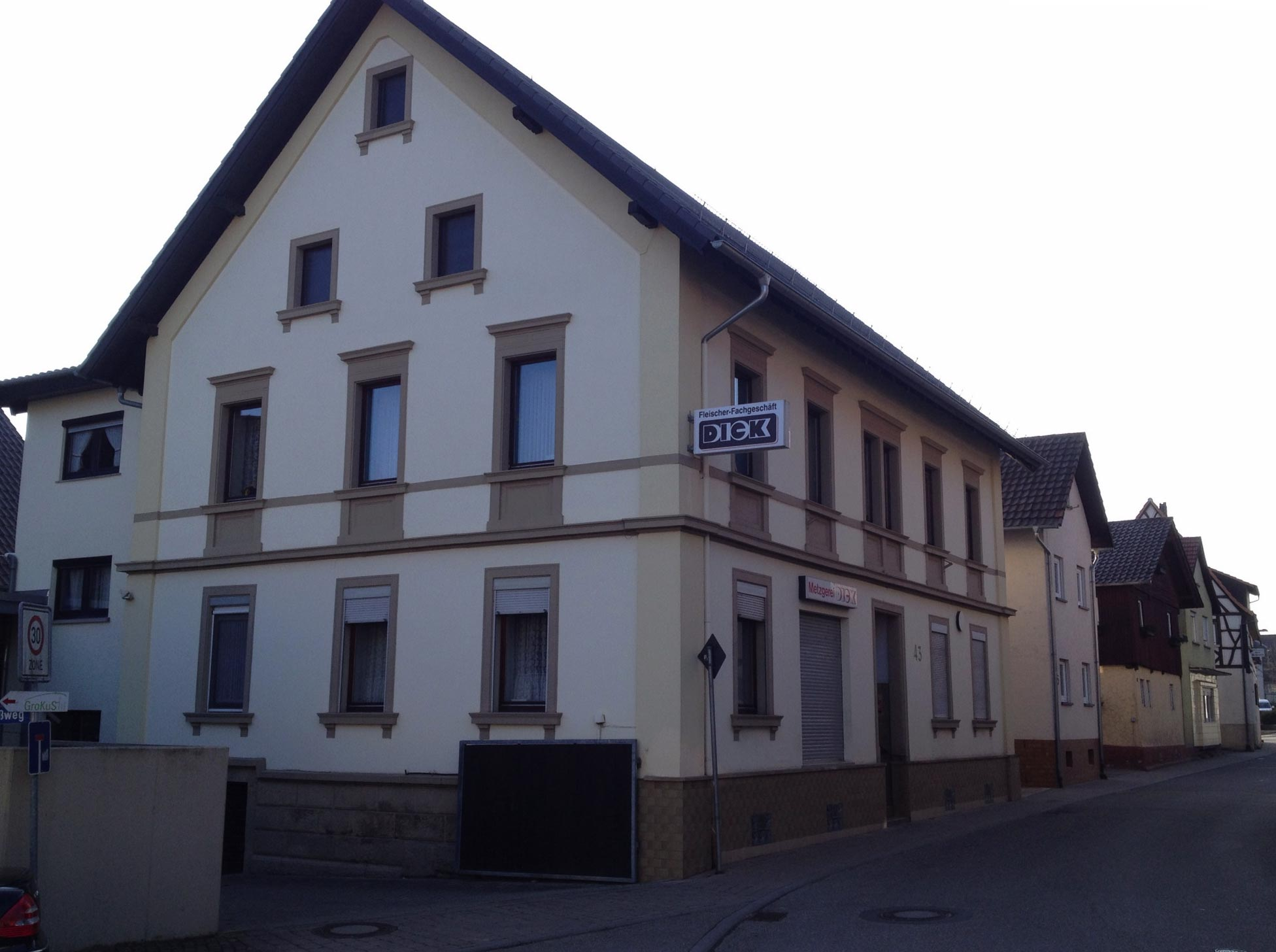 Ehemaliger Gasthof „Krone“ in Grombach